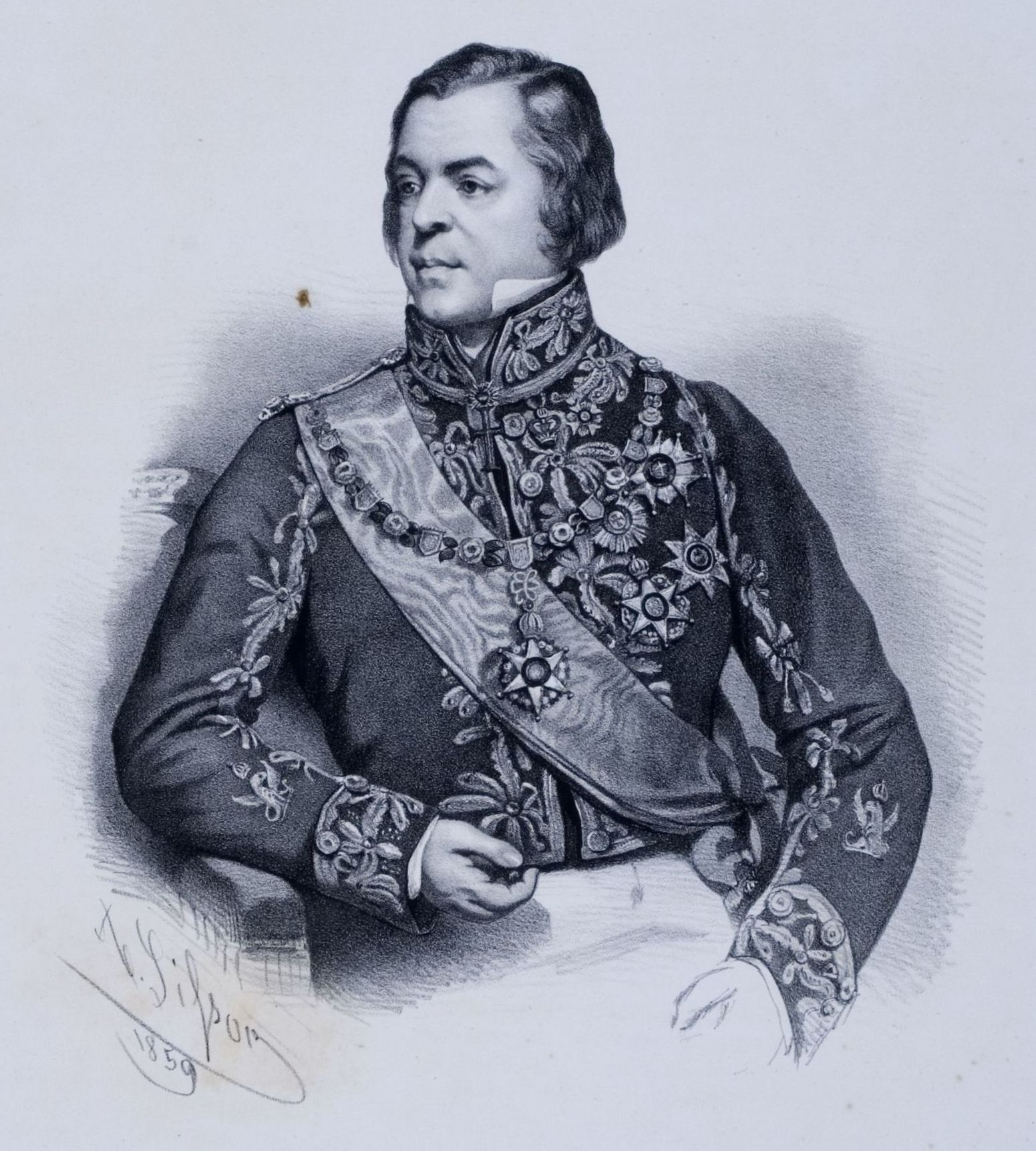 Litografia em preto e branco